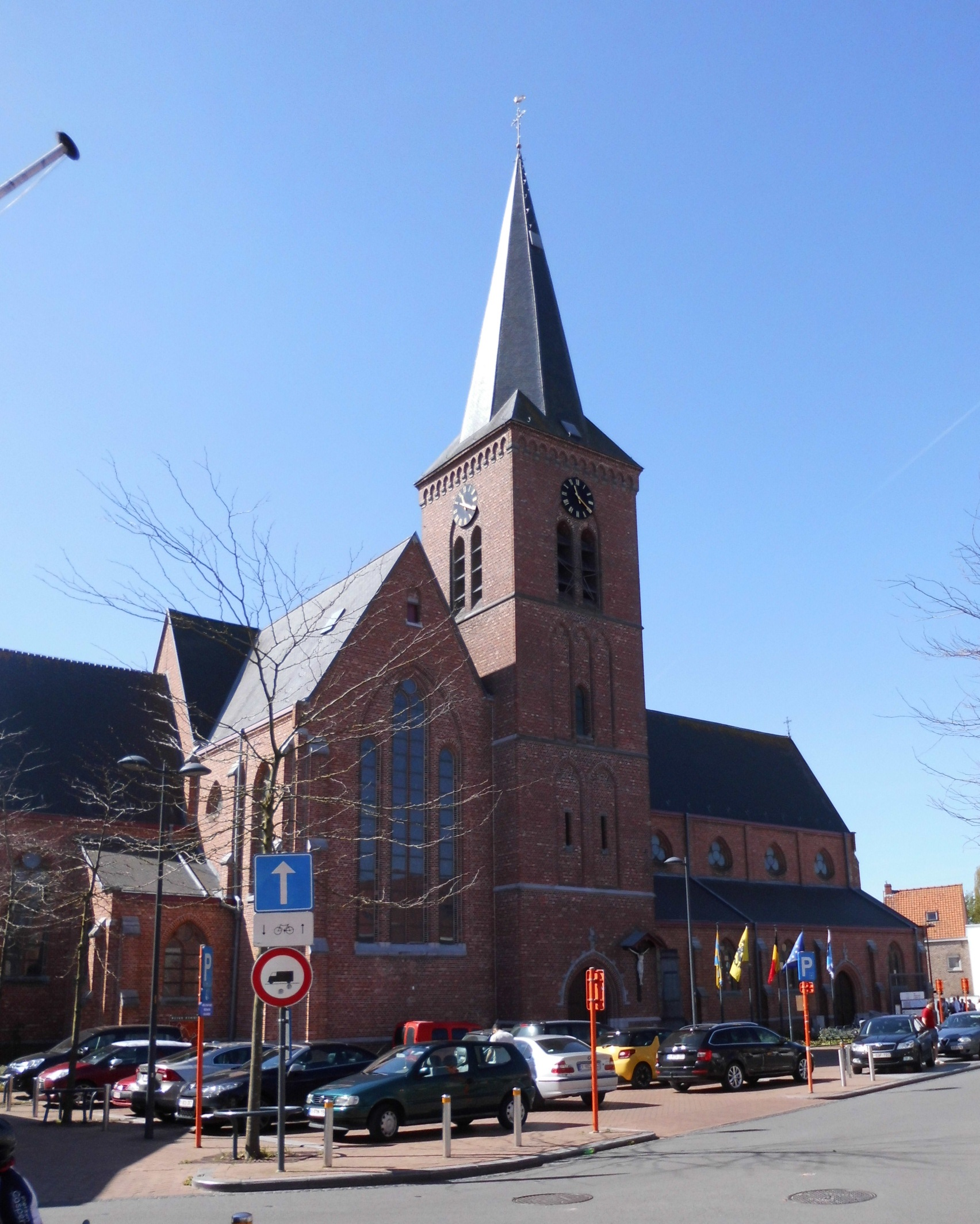 Sint-Pieterskerk - Hulstedorp - Hulste - Harelbeke - West-Vlaanderen - België